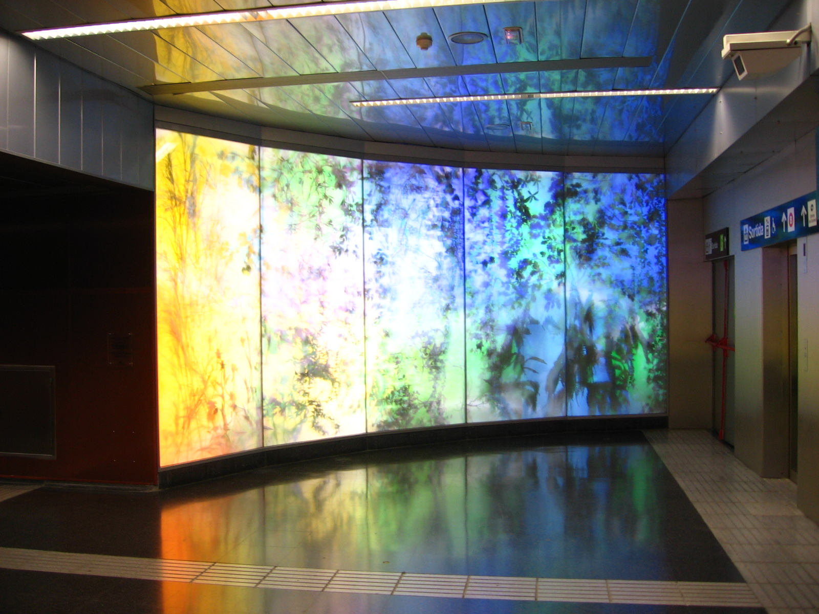 Ciutat Meridiana station, Barcelona Metro/Estació Ciutat Meridiana del metro de Barcelona